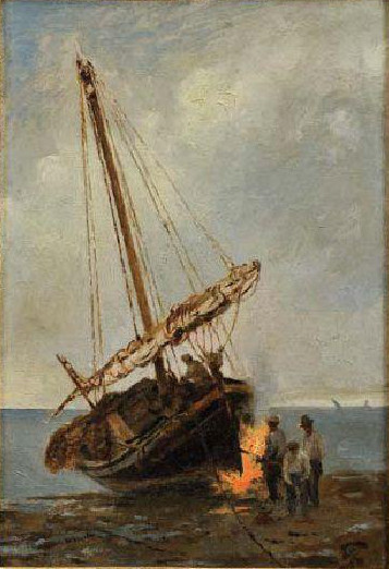 Óleo sobre tela colado em cartão